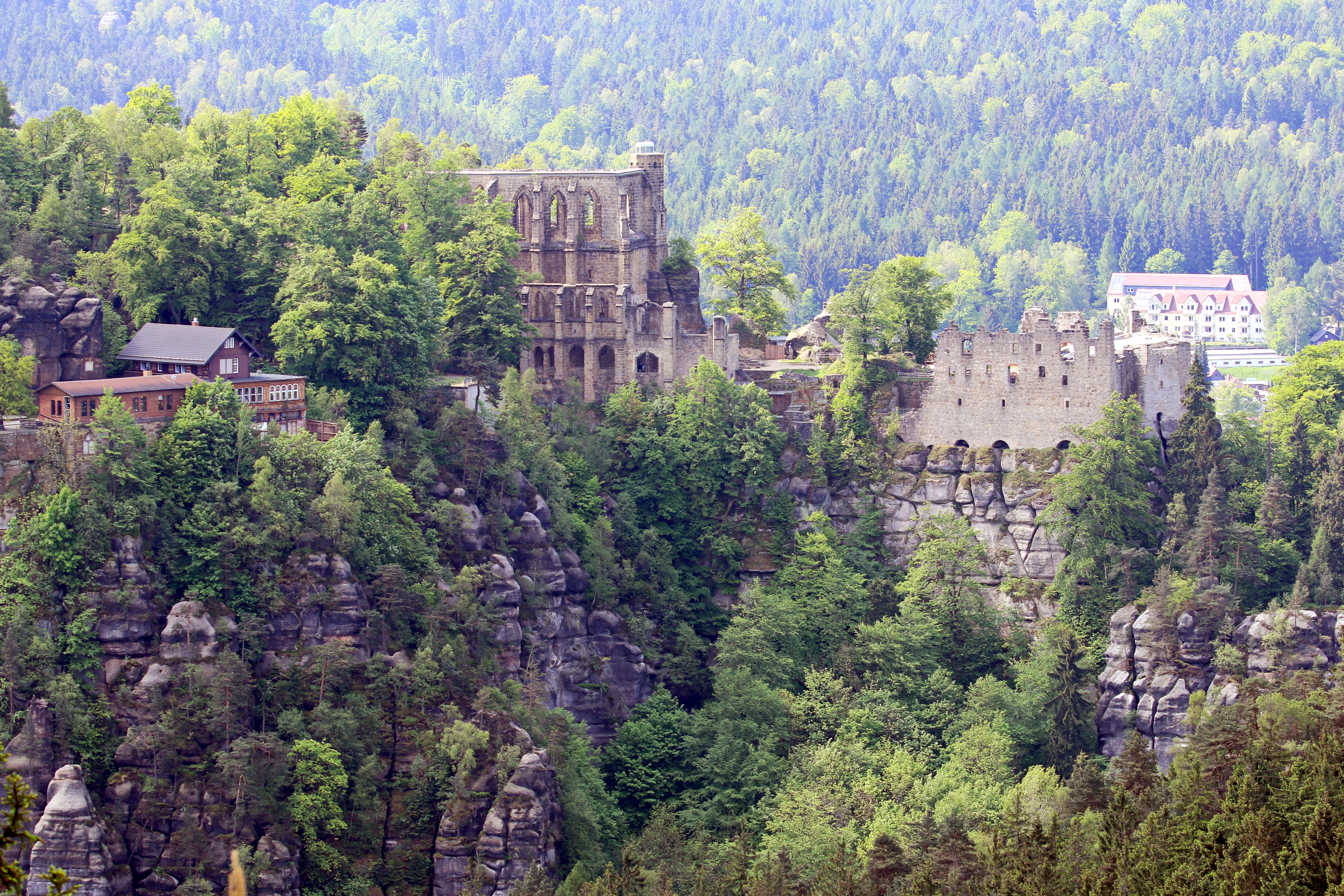 Blick auf den Berg Oybin im Naturpark Zittauer Gebirge in Sachsen.